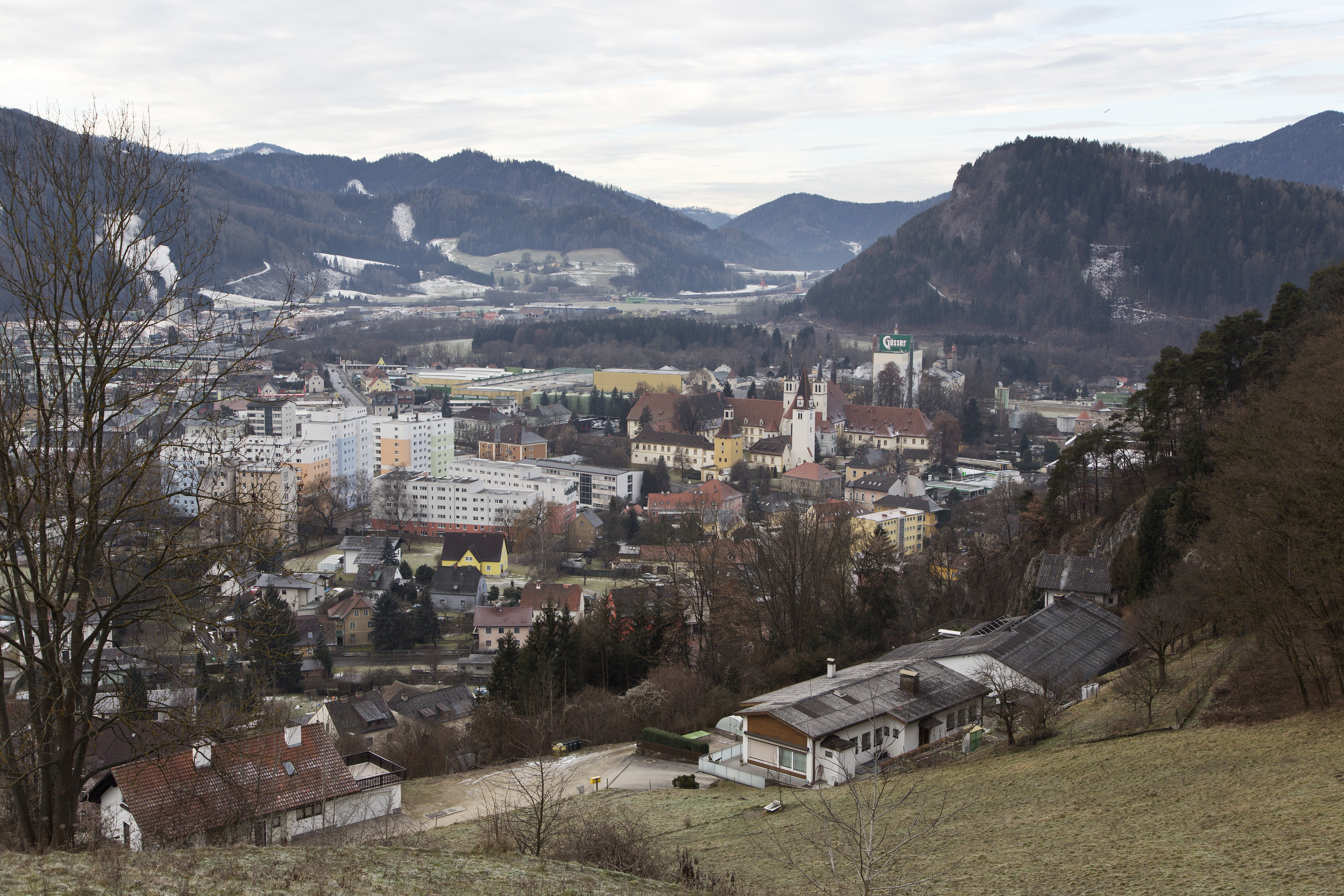 Leoben Göss vom Kalvarienberg